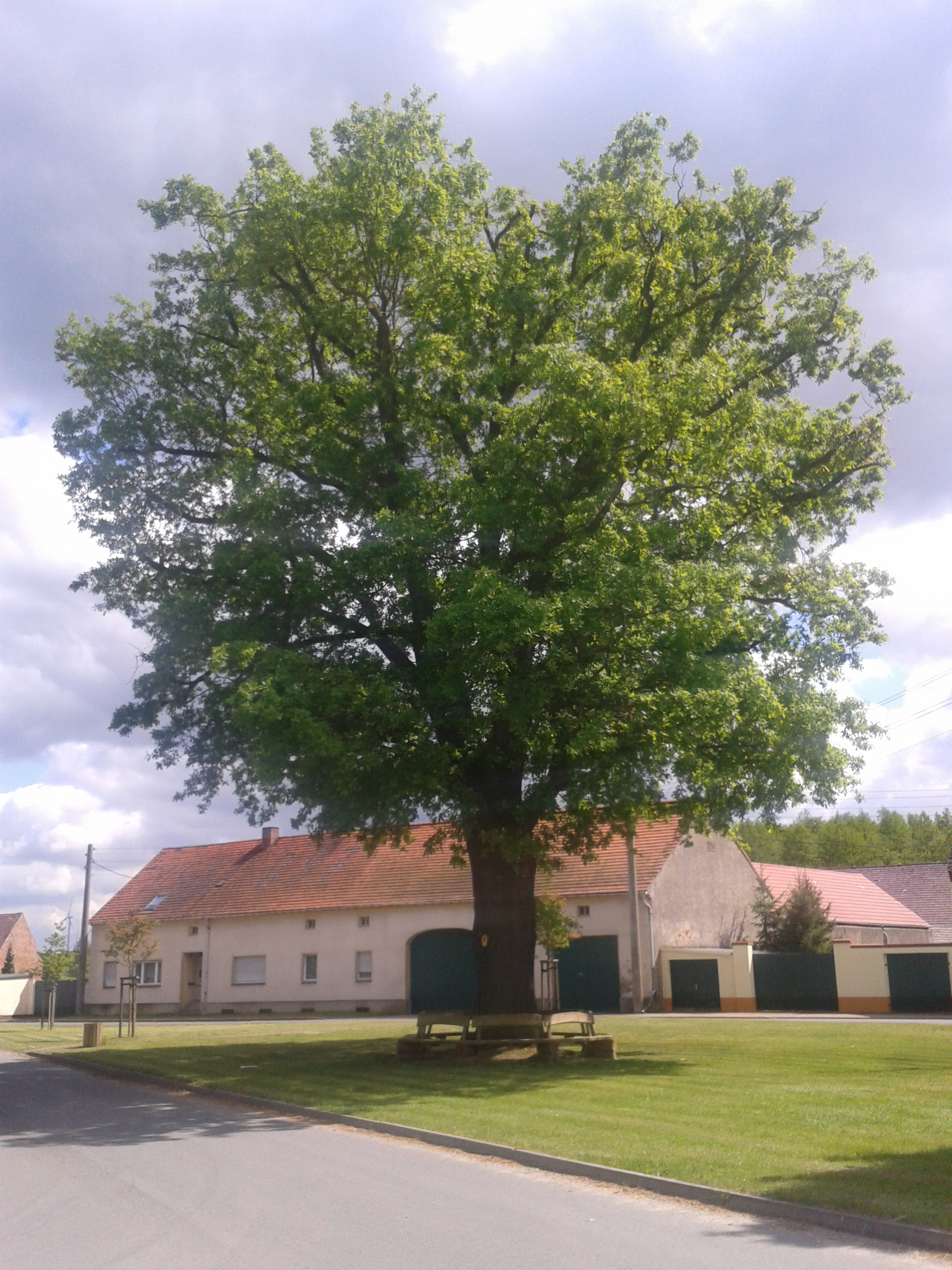 Naturdenkmal in Prensdorf, Nr. 473, Reg.Nr. B0124, Lage: Prensdorf, 0,1 km SW Kirche, Typ: Baum, Name: Eiche, Flur: 3, Flurstücke: 63, Schutzgrund: Schönheit (Ortsbild)